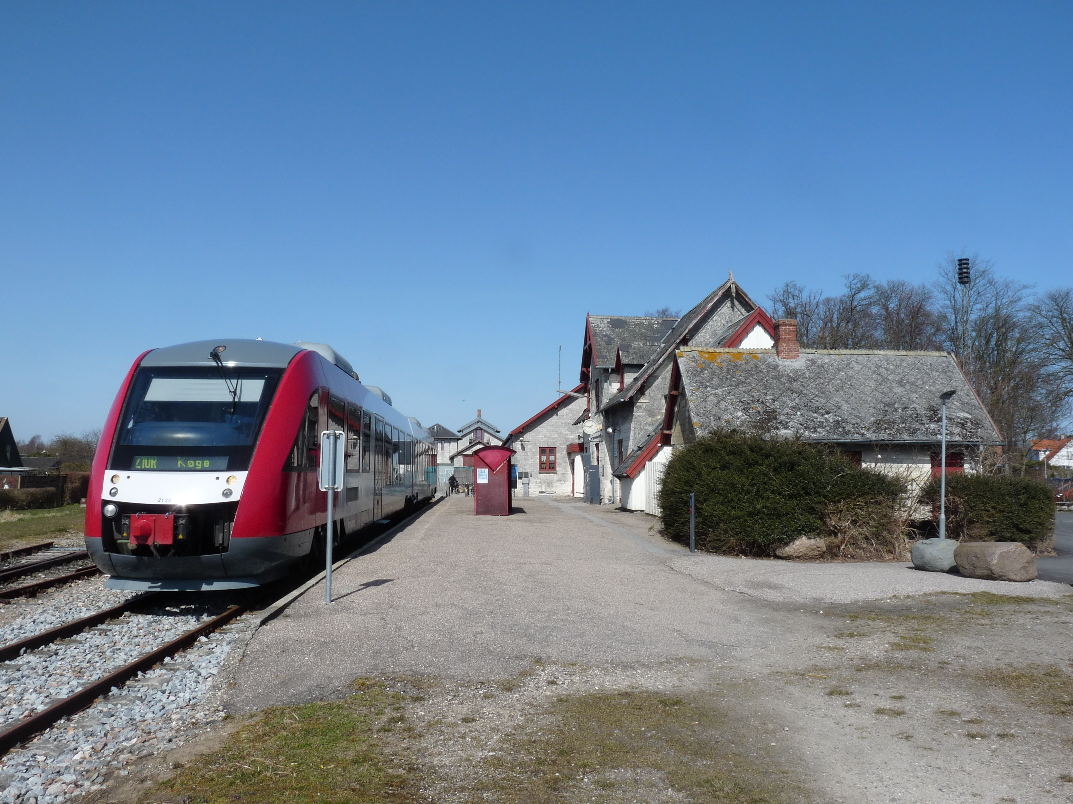 Trein Rødvig station